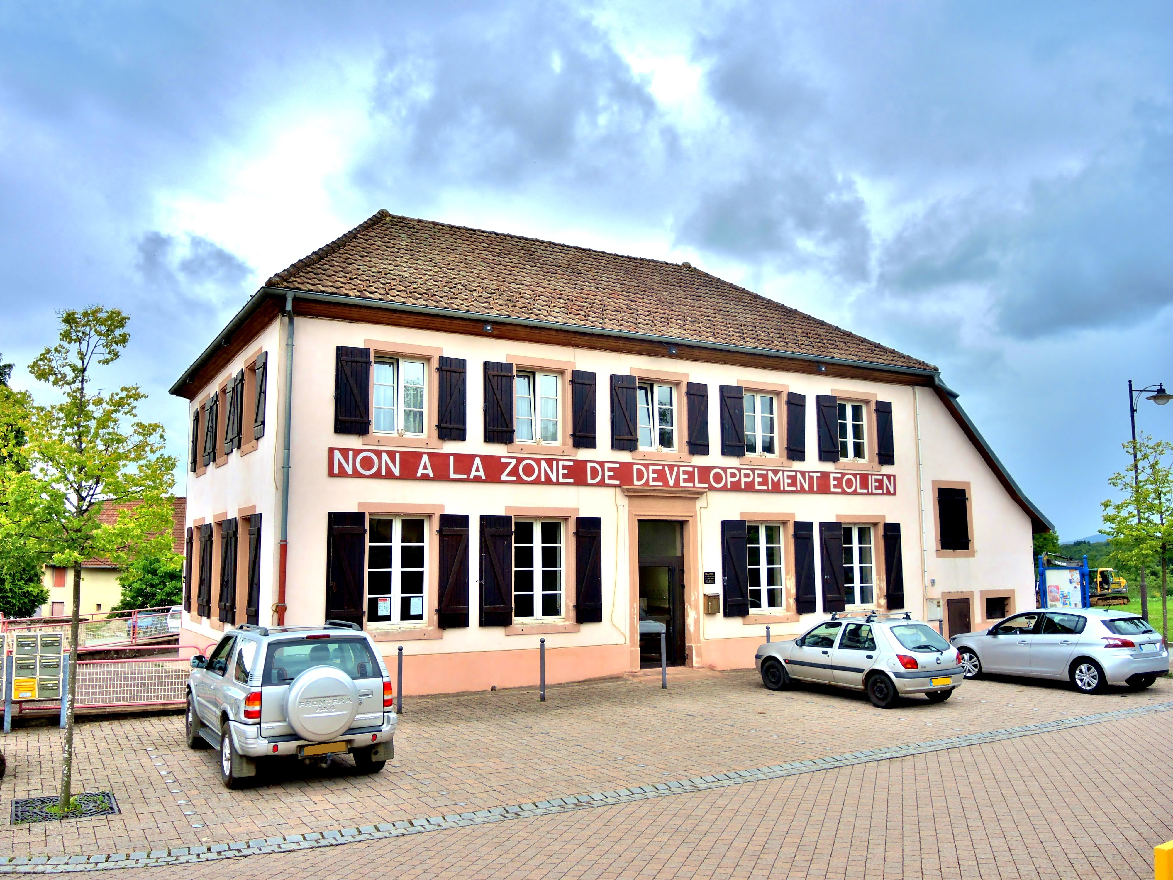 Mairie de Grosmagny. Territoire de belfort